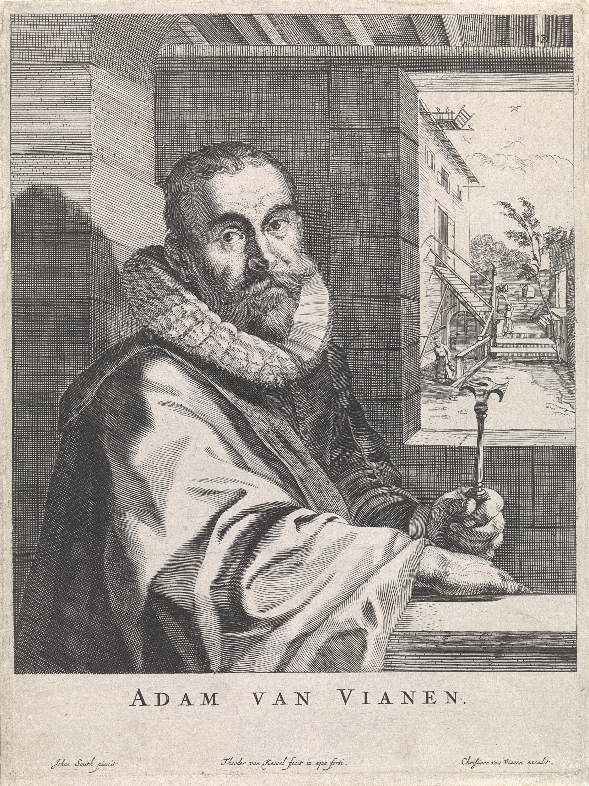 Portret ten halven lijve naar rechts van de edelsmid Adam van Vianen, in zijn linkerhand een hamer houdende. Door het venster, waar Vianen voor zit, is een binnenplaats te zien. prentmaker: Theodorus van Kessel (vermeld op object) naar ontwerp van: Johan Smith (vermeld op object) uitgever: Christiaen van Vianen (vermeld op object)